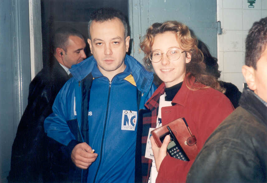 archivio personale di Cinzia Donati